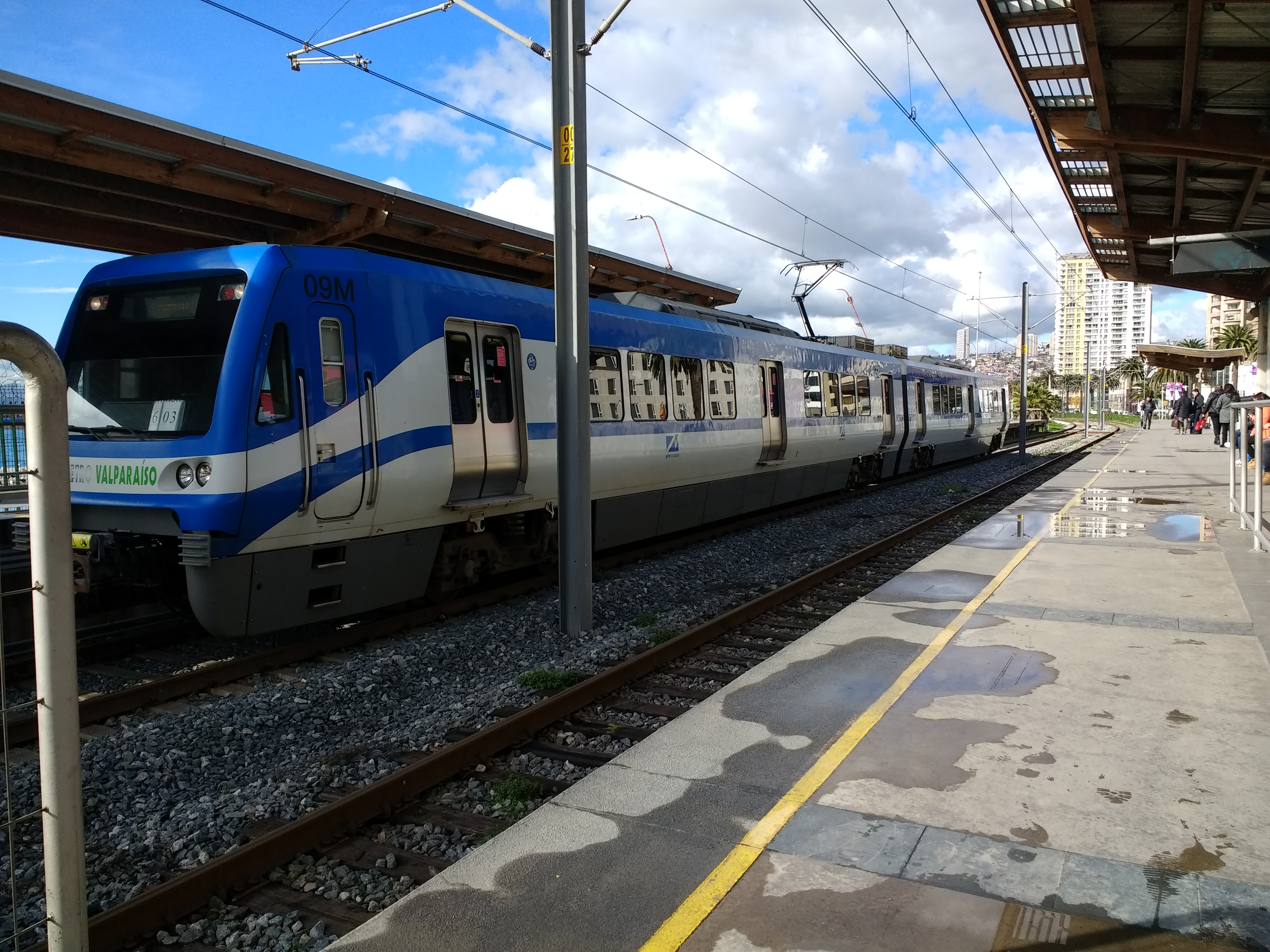 Estación Bellavista del Metro Valparaíso.